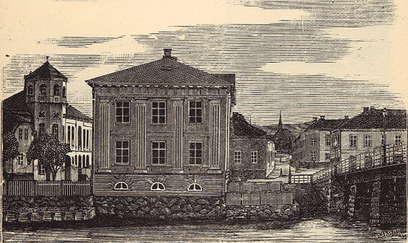 Parti fra Nordsiden, Fredrikshald (Halden).